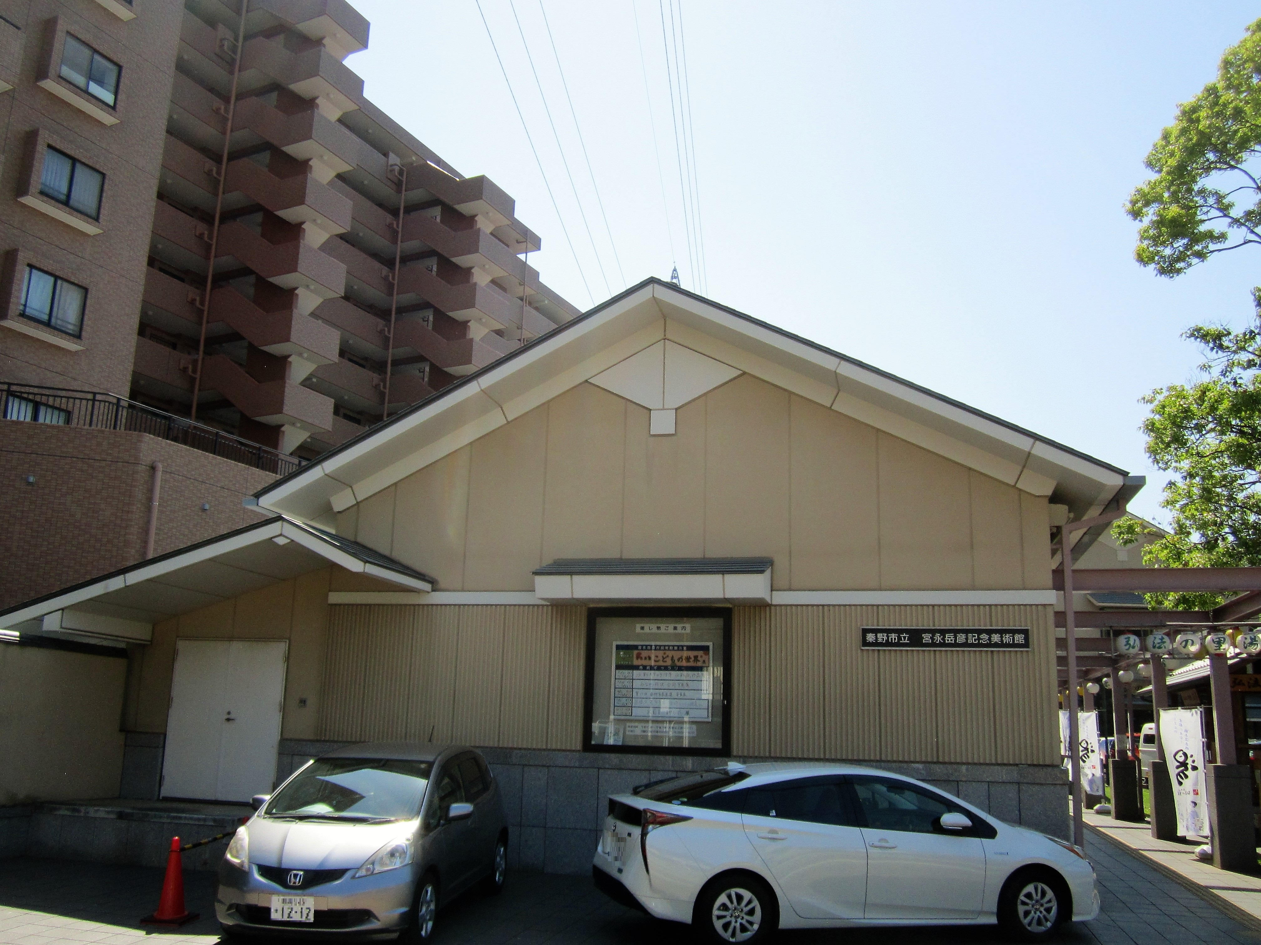 秦野市立宮永岳彦記念美術館（秦野市鶴巻北） Canon PowerShot A2200